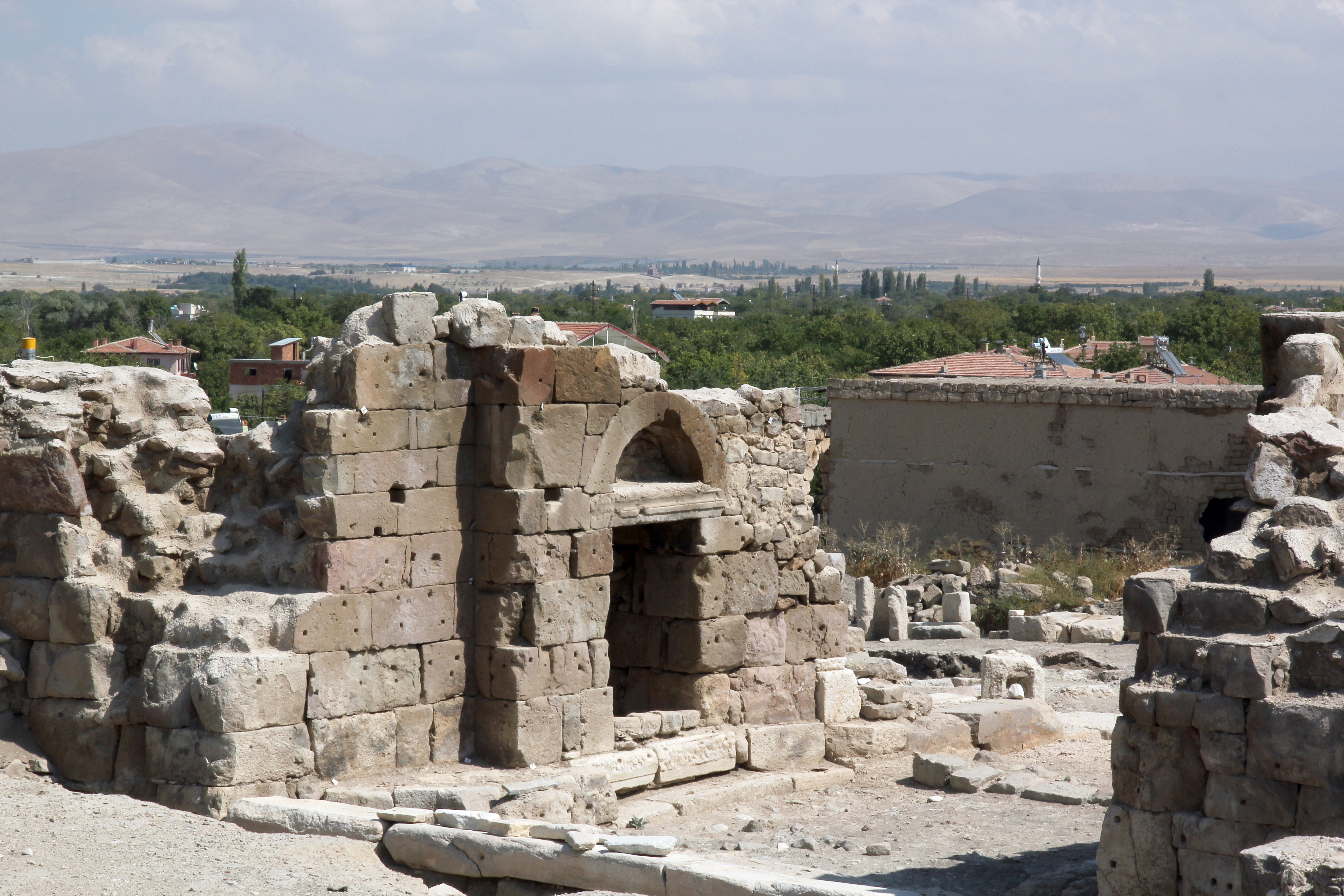 Tyana, römische Ruinen in Kemerhisar, Zentraltürkei